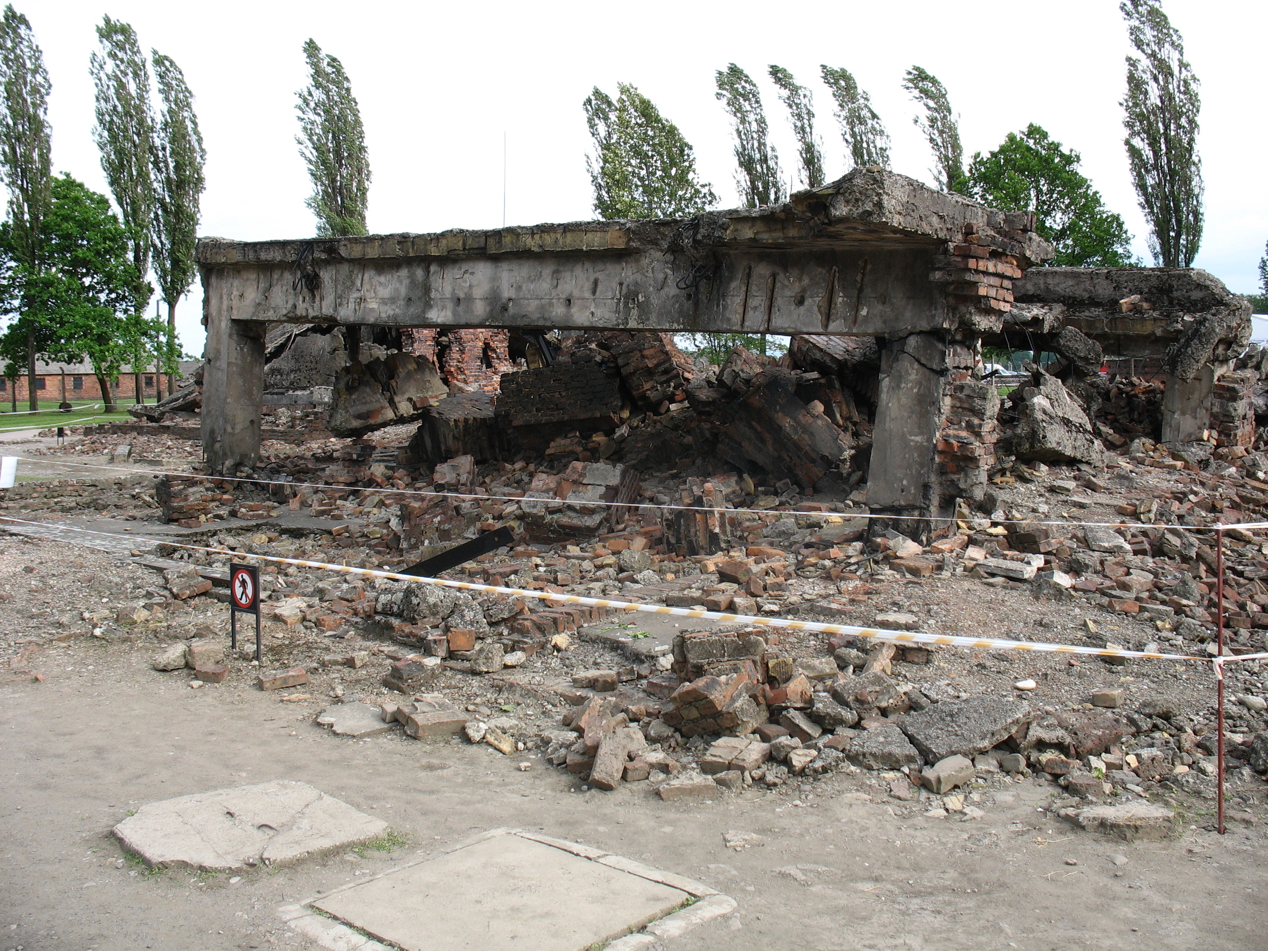 Zburzone w 1945 przez Niemców krematorium w Byłym Nazistowskim Niemieckim Obozie KL Birkenau. Autor: Sharx